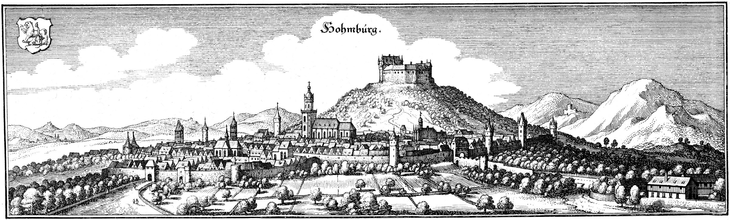 Homberg (Efze) von Matthäus Merian 1655 / Ansicht von Homberg/Efze